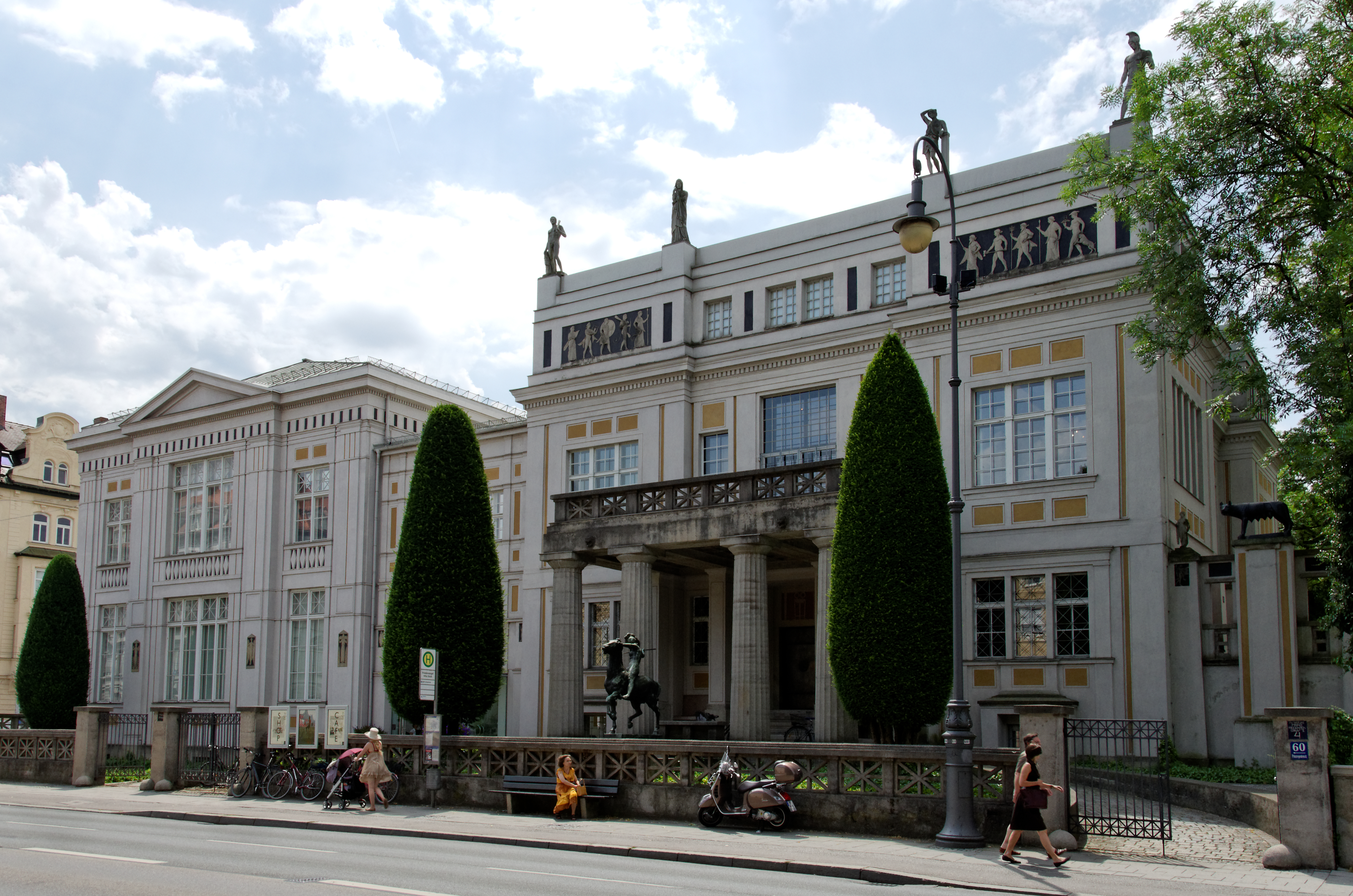 Façade du Museum Villa Stuck, Prinzregentenstr.60 Munich